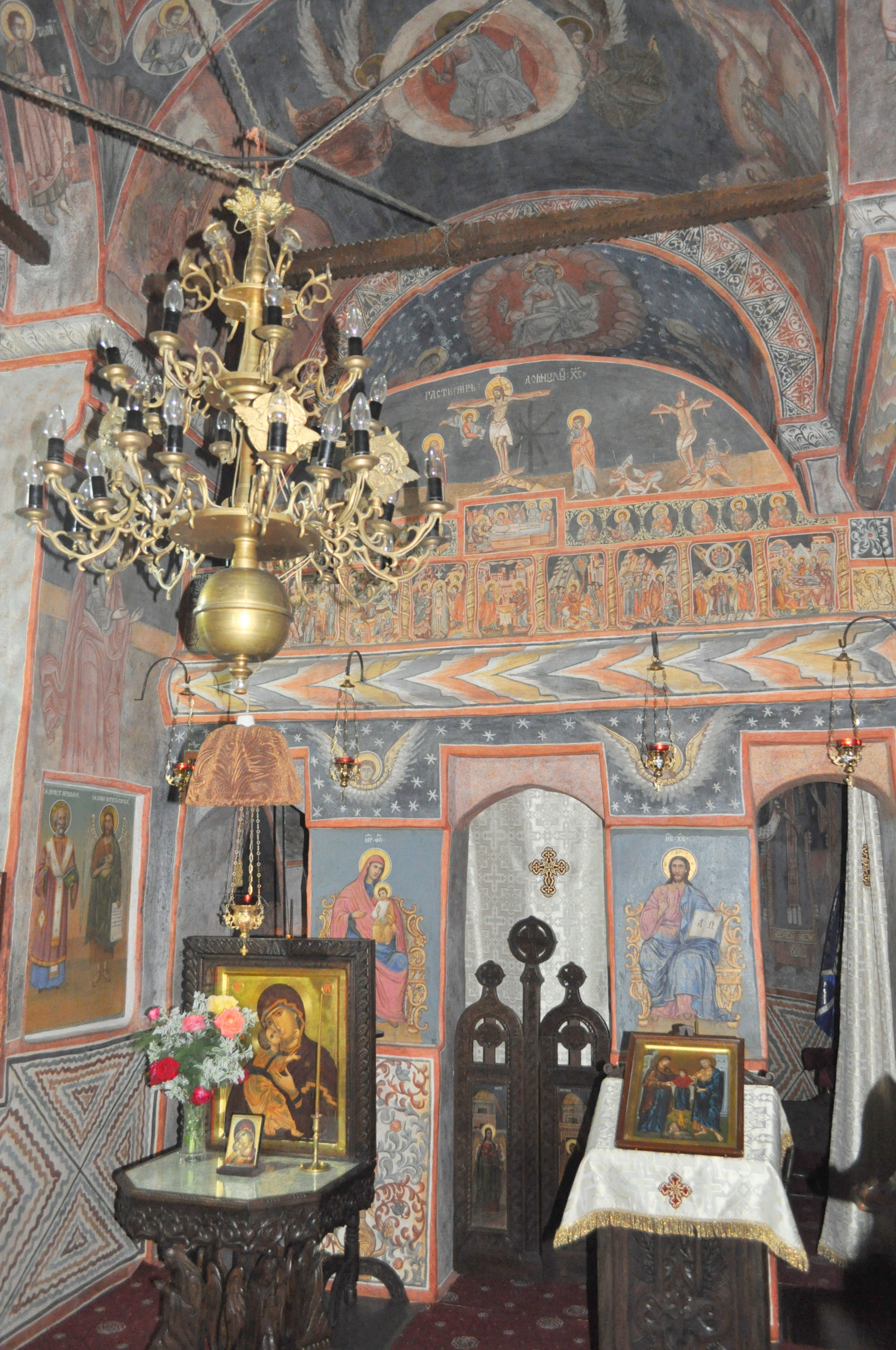 Biserica „Sfinţii Ioachim și Ana”, sat Târgu Logrești; comuna Logrești 01